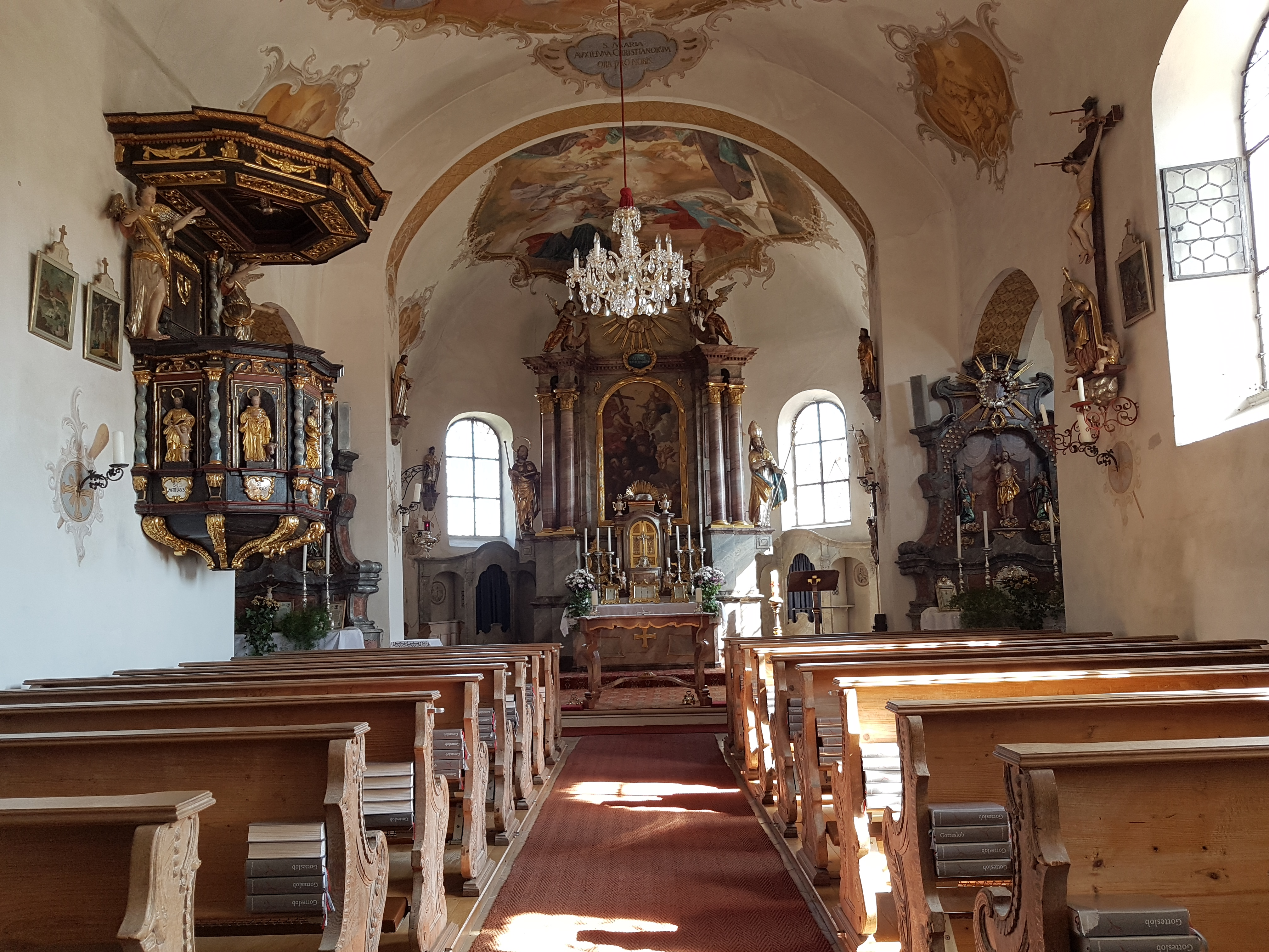 Holzburg (Ried bei Mering), Kirche